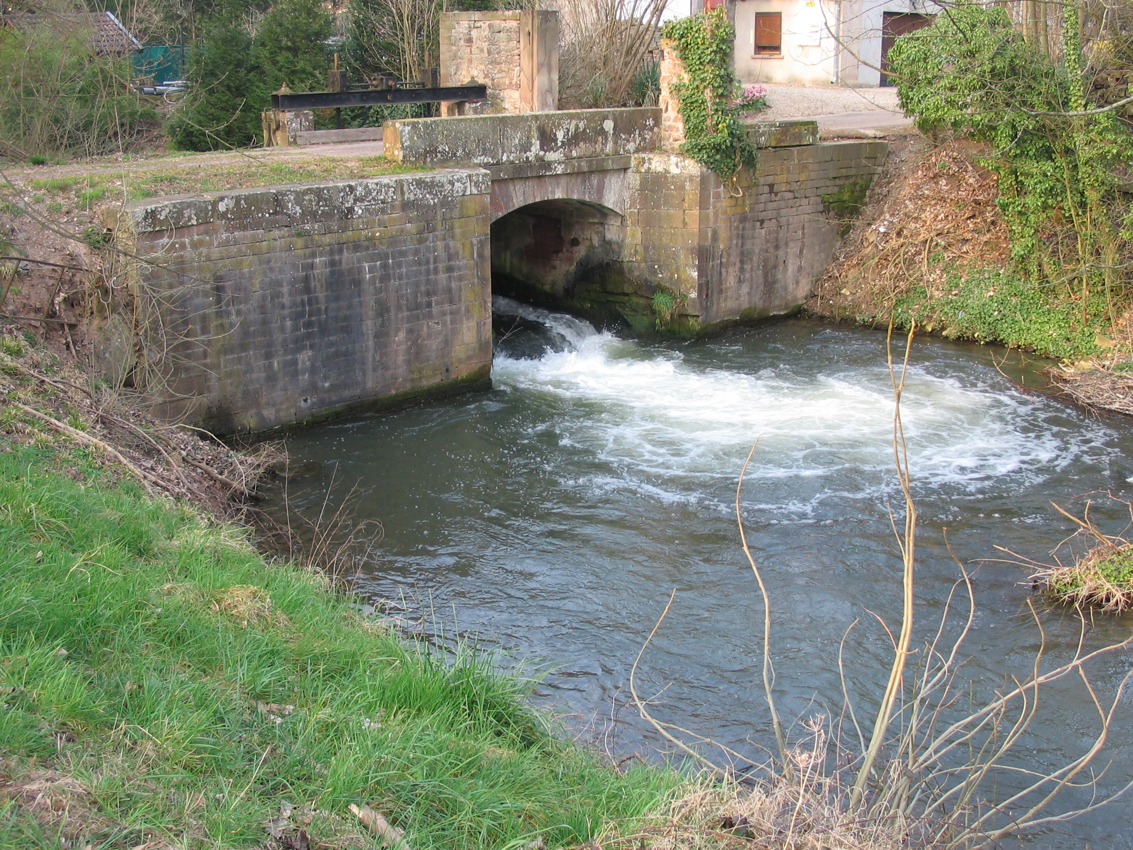 ouvrage hydraulique qui démarre le canal de la Bruche à l'entrée de Wolxheim, dans le Bas-Rhin